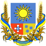 Герб Теплицького району